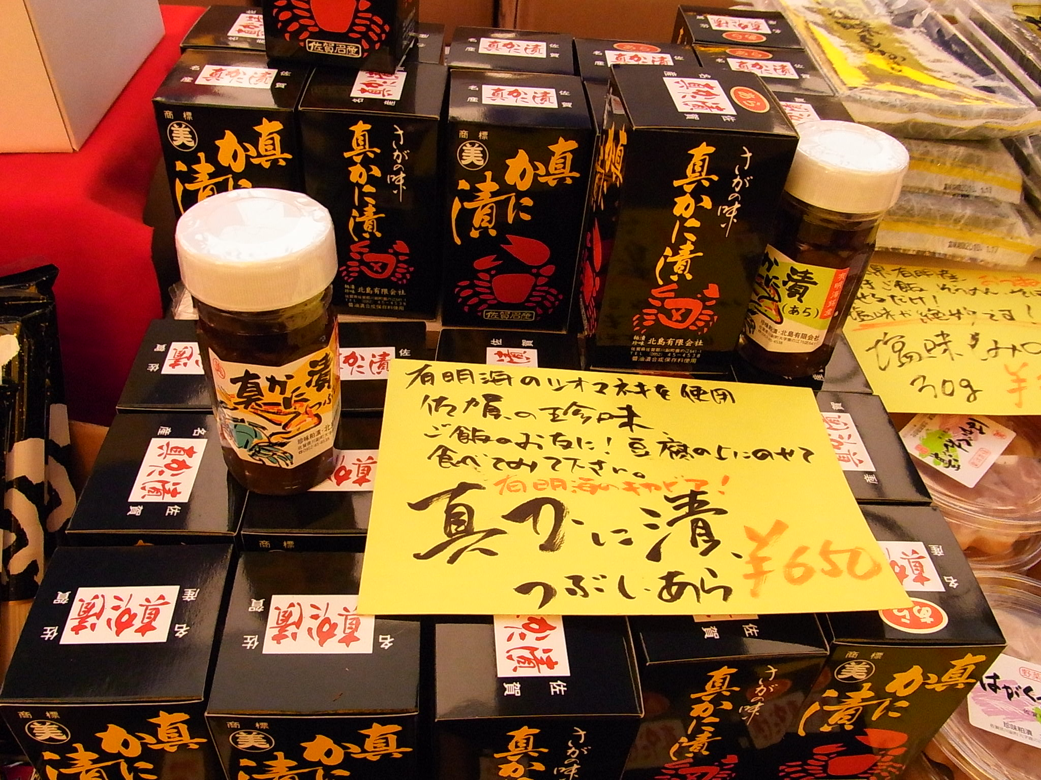 真かに漬け